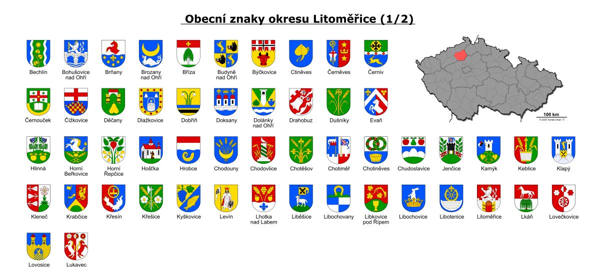 Přehled obecních znaků okresu Litoměřice